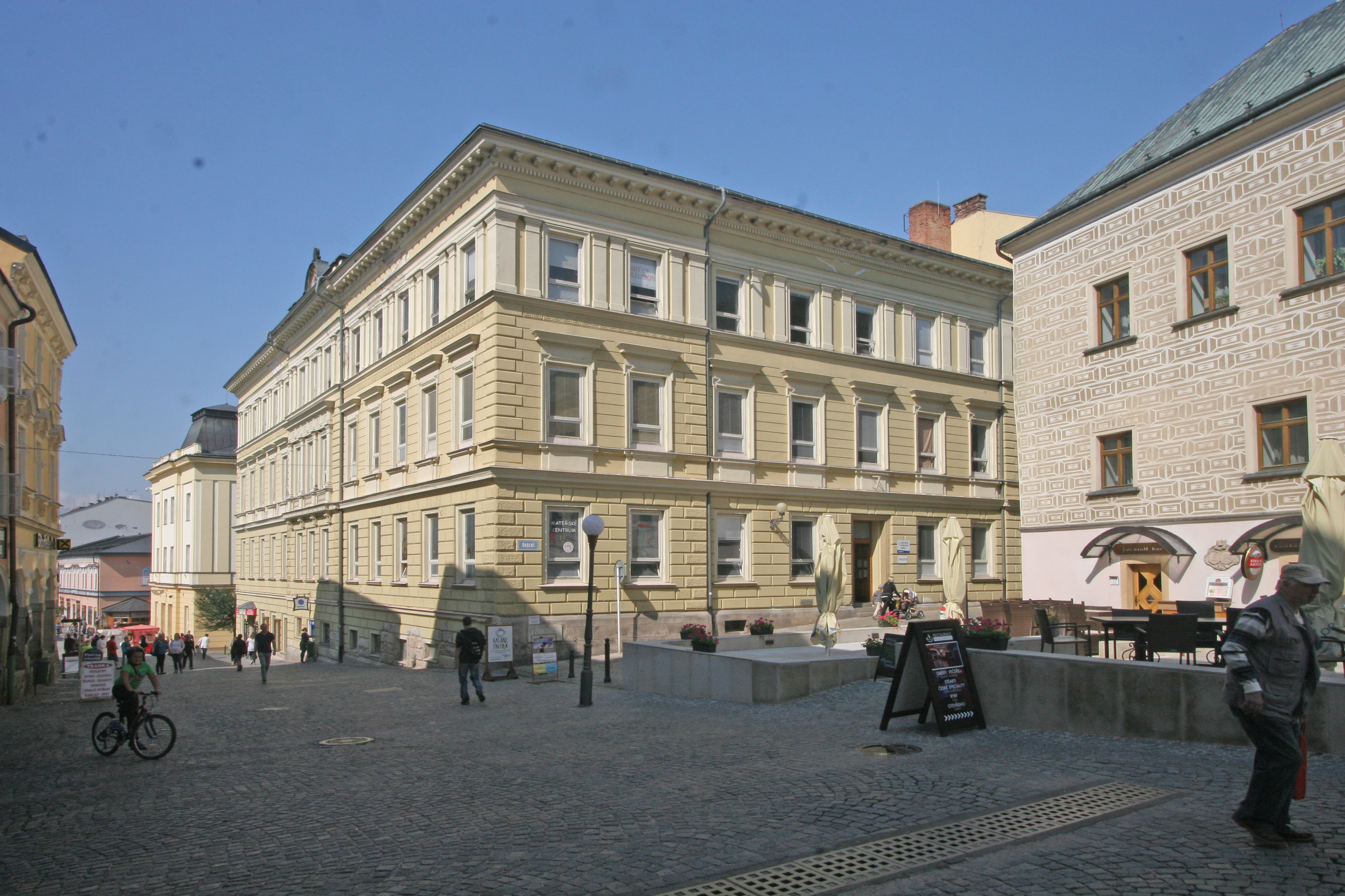 Škola, roh ulic Školní, Horská a Hradební 13/1, Horní Předměstí, Trutnov.